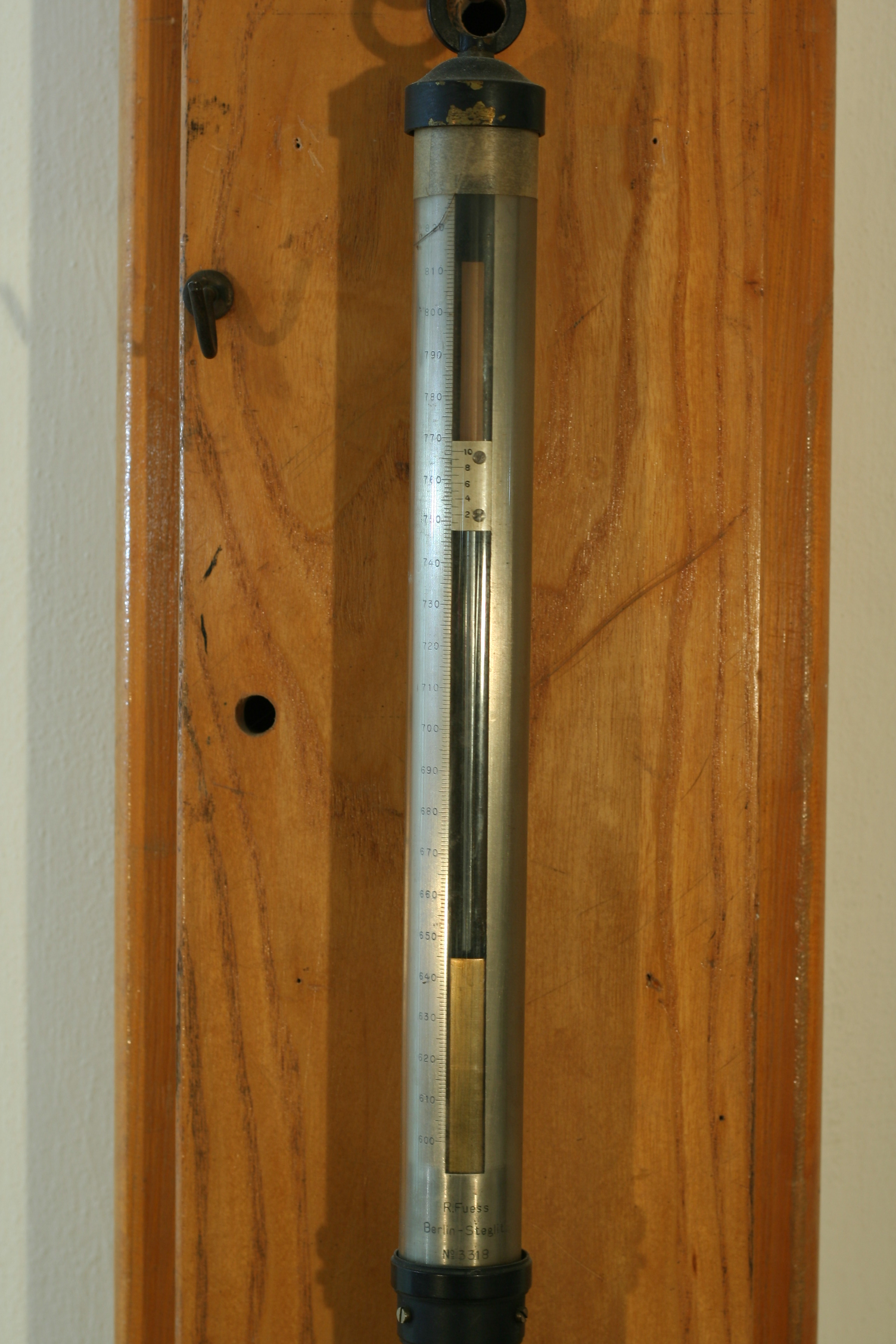 Nonius rtuťového barometru.